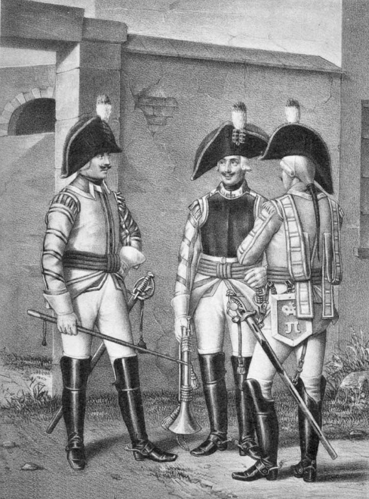 Штаб-трубачи Кирасирских полков: Рязанского и Ямбургского, 1797-1800, и Глуховского, 1797-1801.